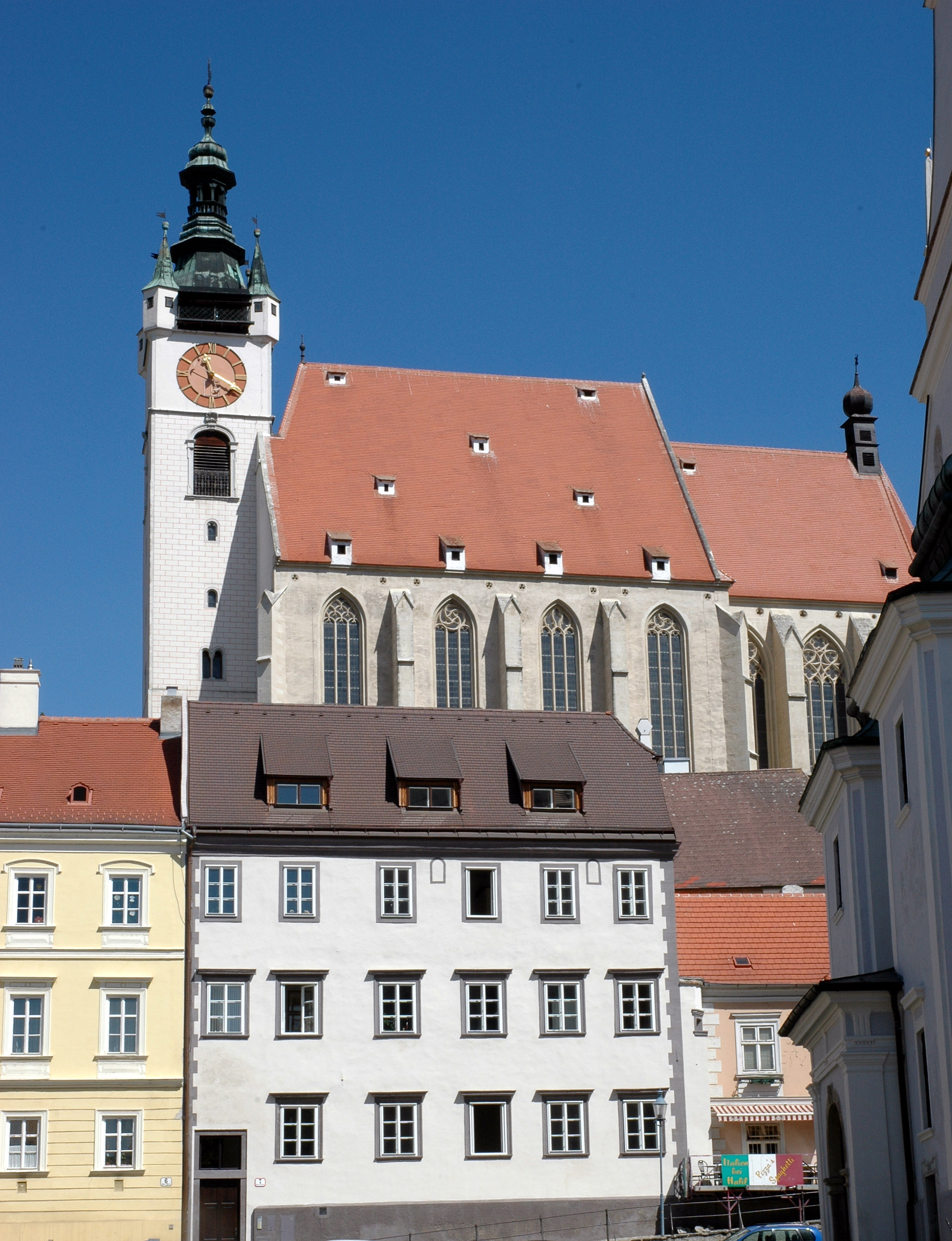 Piaristenkirche von Krems - Frauenbergturm; im Vordergrund: Altes Gymnasium, Weinbauschule von 1898 – 1903.